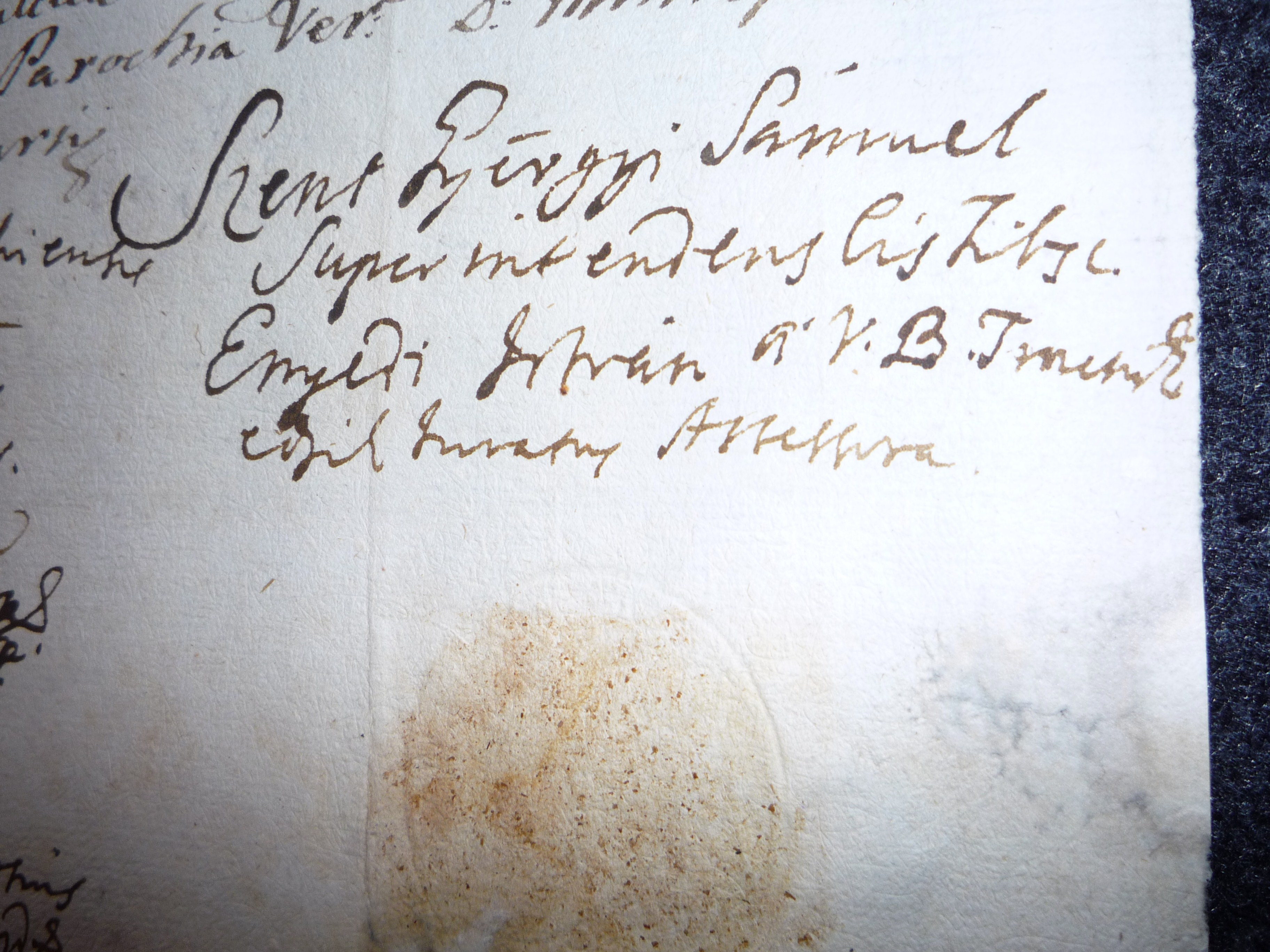 Szentgyörgyi Sámuel, református püspök saját kezű aláírása, az eredeti 1739. március 16-án, a putnoki református parókián kelt, viaszpecséttel ellátott, családi levéltárban meglévő okiraton.